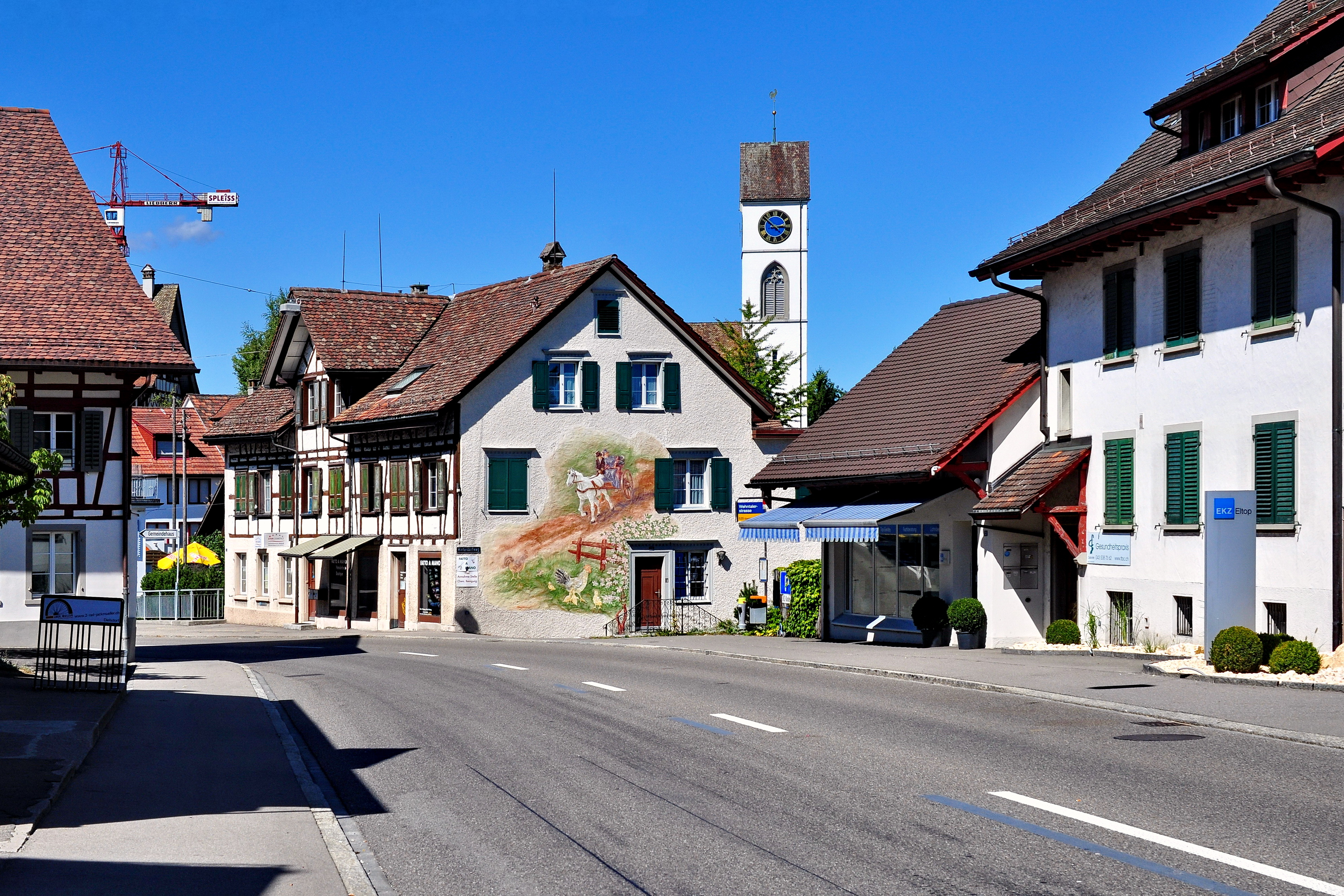 strasse in Dielsdorf (Switzerland)